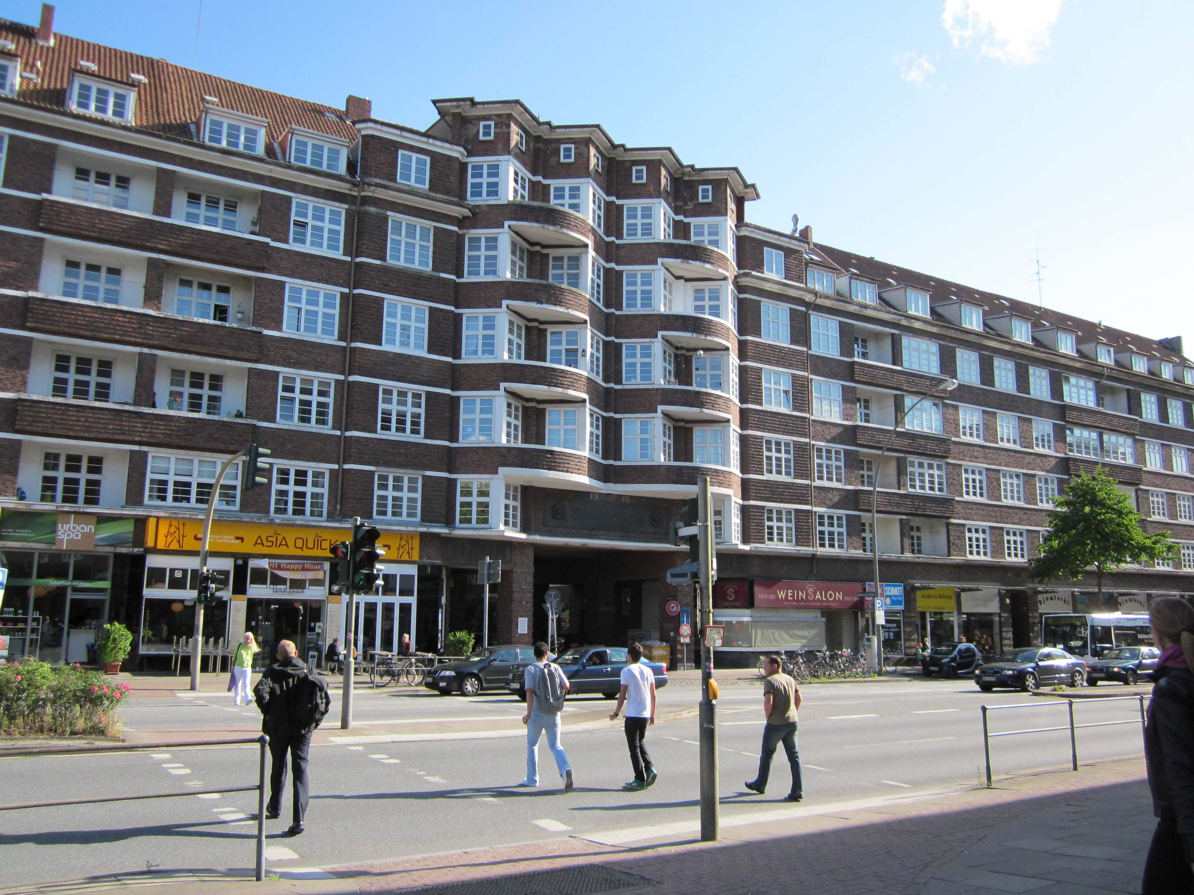 Das Wohn- und Geschäftshaus Hudtwalckerstraße 24-30 am Winterhuder Marktplatz in Winterhude wurde 1928 nach Plänen von Johannes Hansen für J. D. Fahrenkrug & Sohn erbaut. Auffällig sind vor allem die expressionistischen Erker über der Tordurchfahrt.